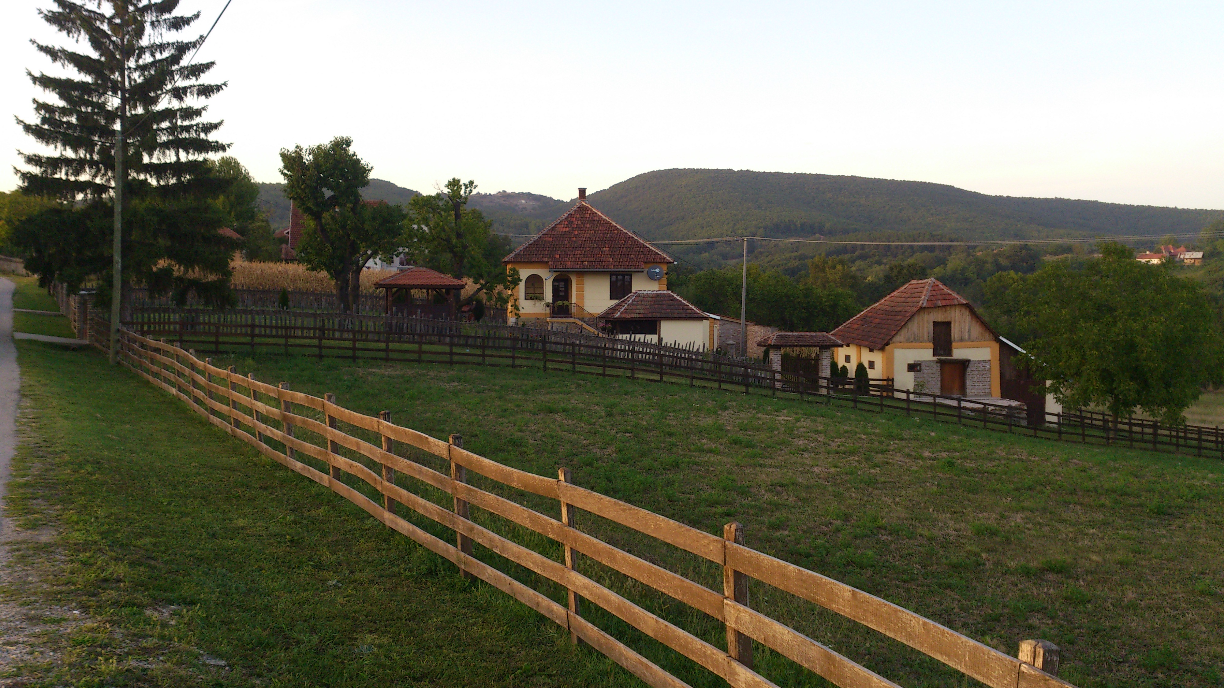 Обновљено сеоско домаћинство у Милићевцима.